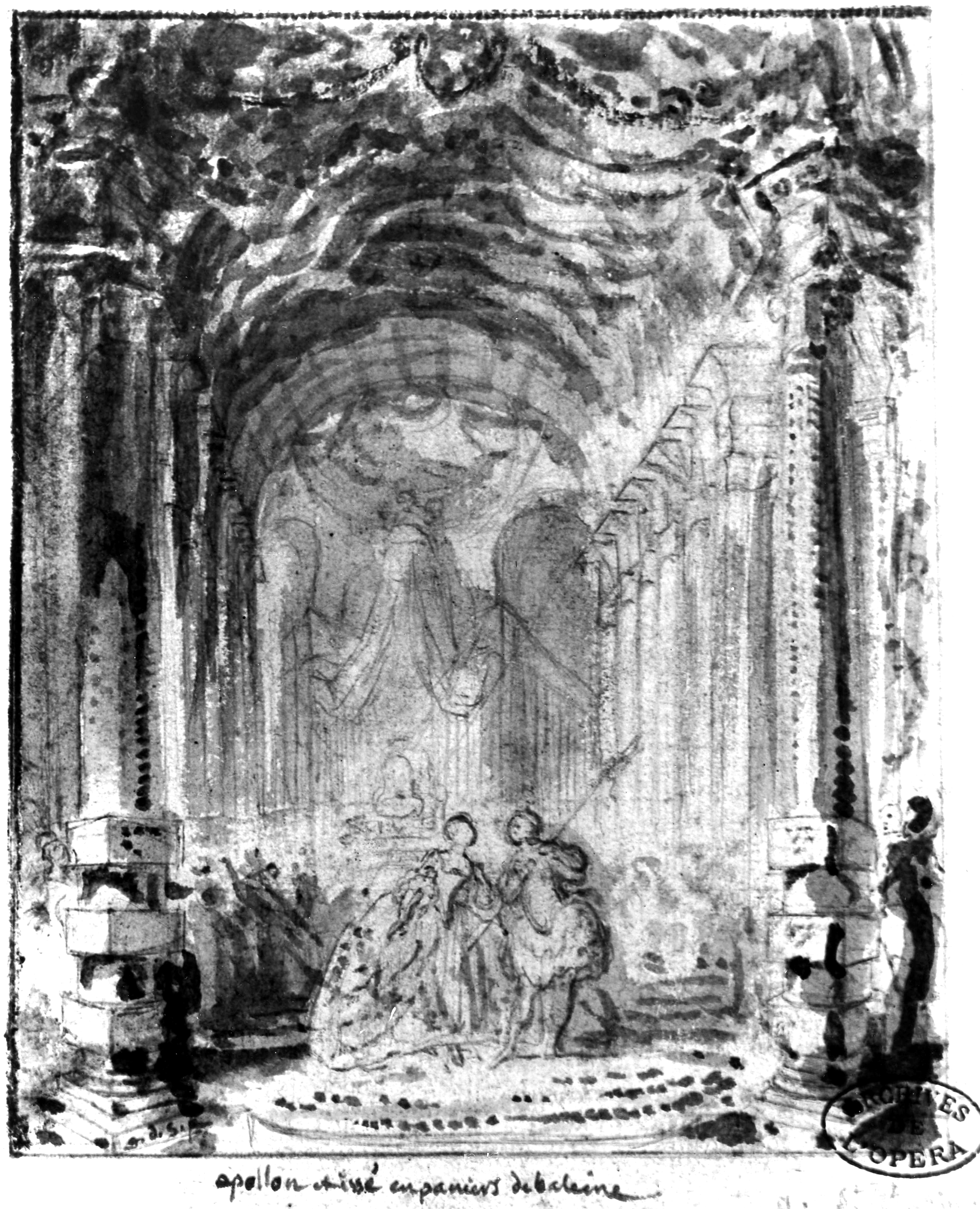 André Cardinal Destouches - Issé - G. de Saint-Aubin - Apollon et Issé en paniers de baleine